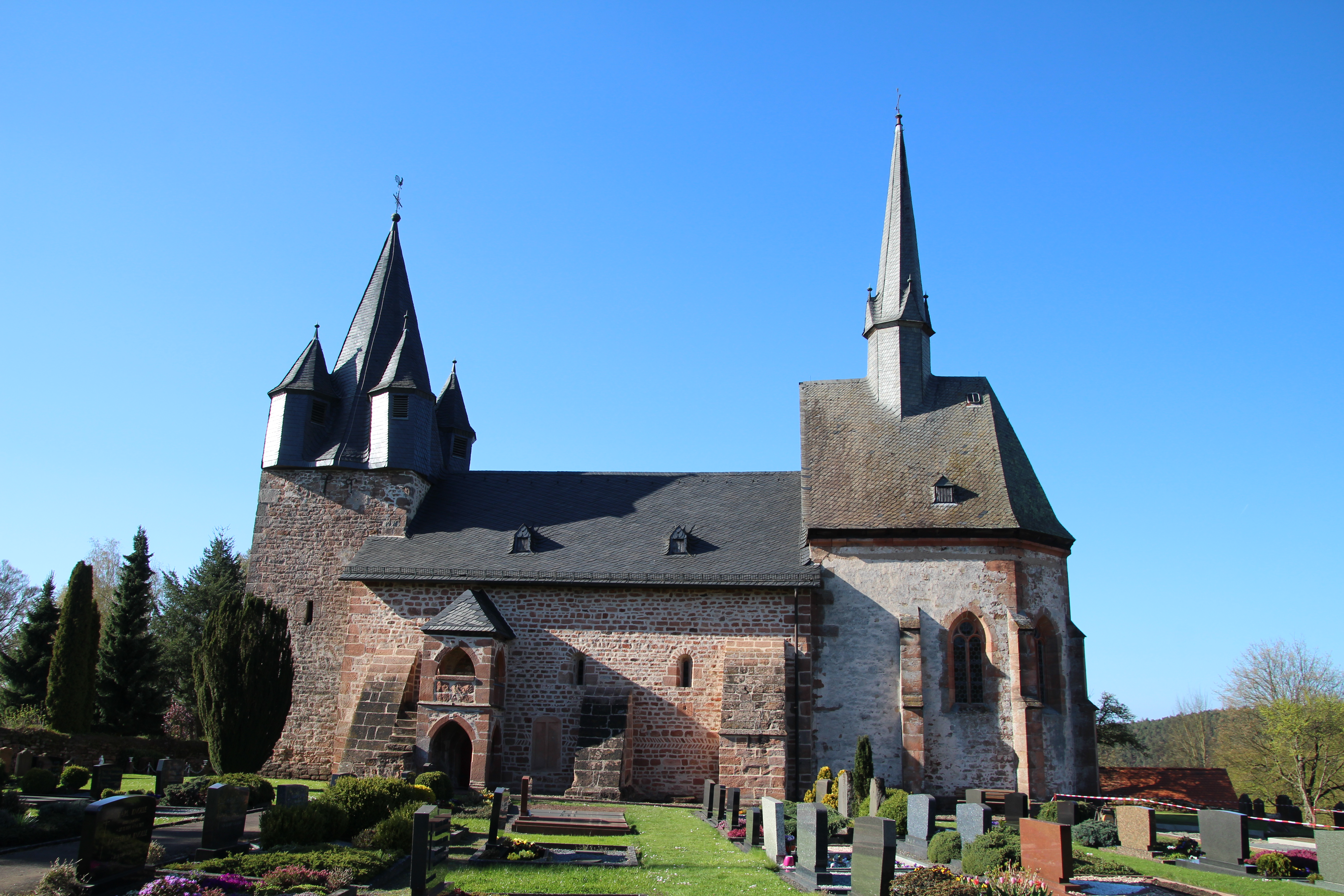 Christenberg